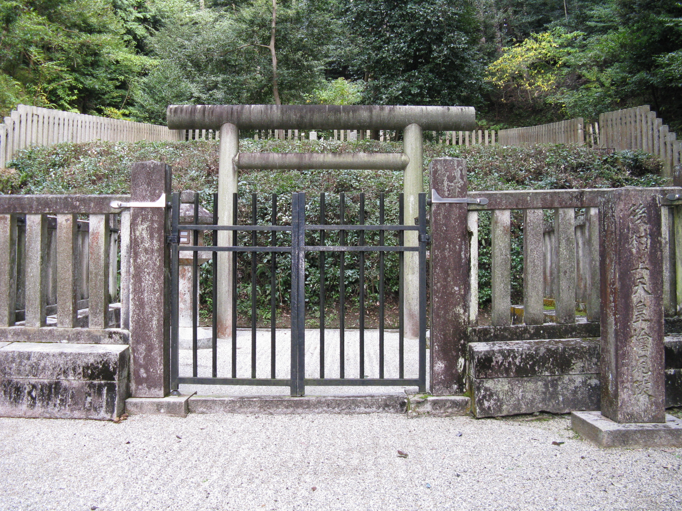 観心寺 後村上天皇檜尾陵